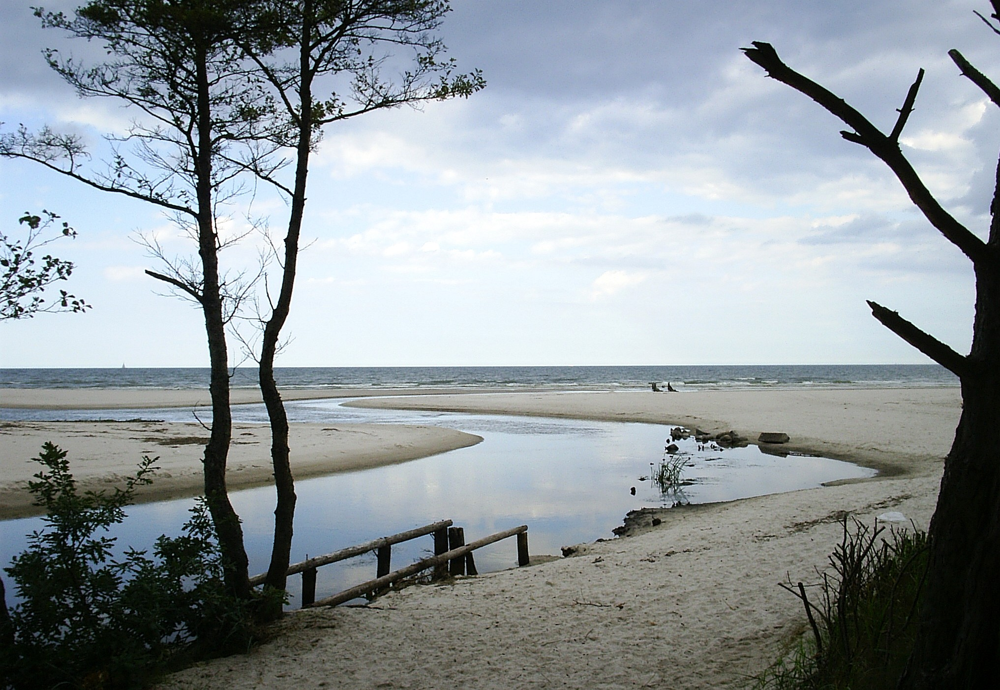 Ujście rzeki Piaśnicy do Morza Bałtyckiego